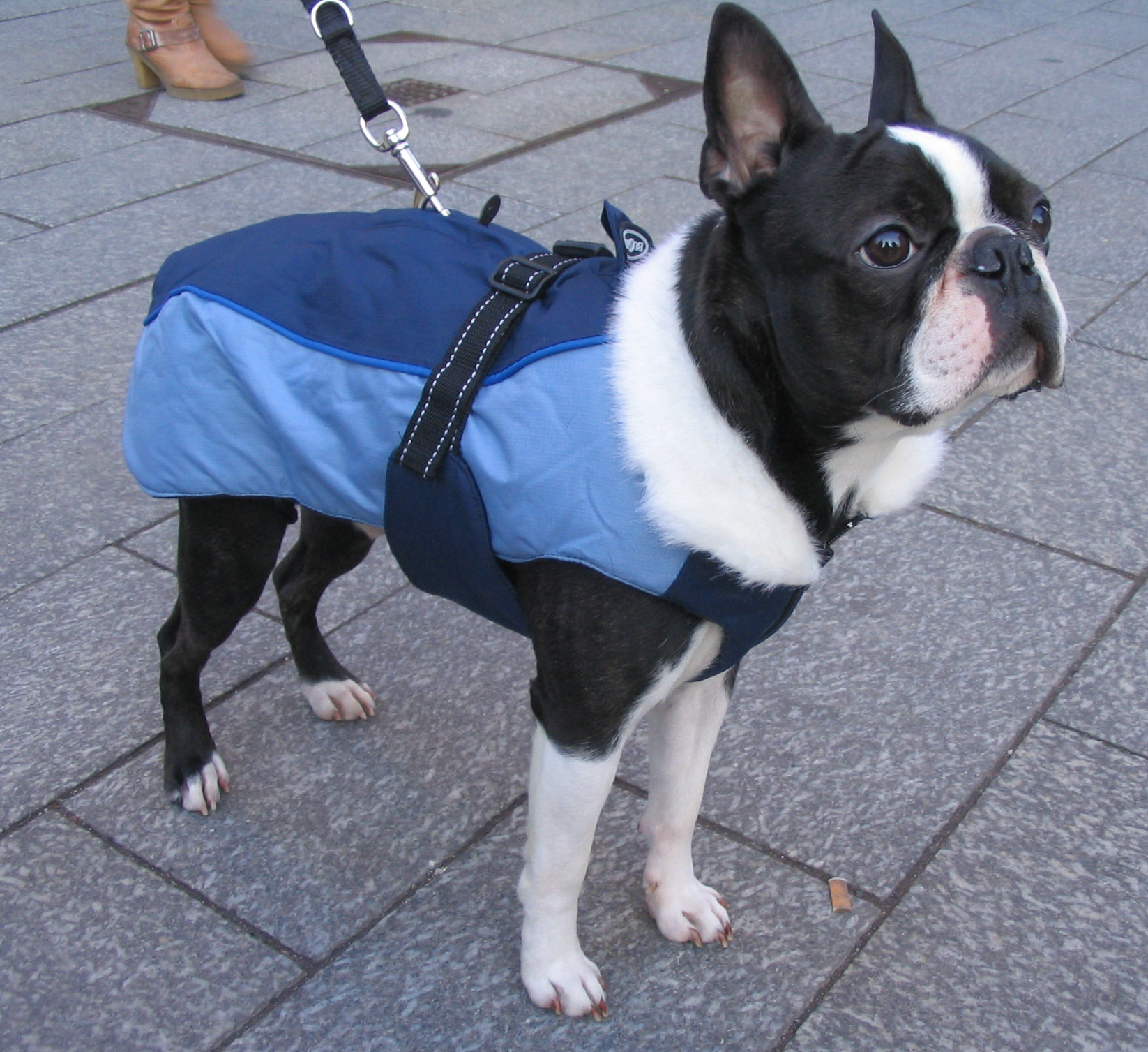 "Sein erster Winter". Hund auf der Königsallee, Hundemäntelchen mit Verbrämung aus jasmin Nerz.